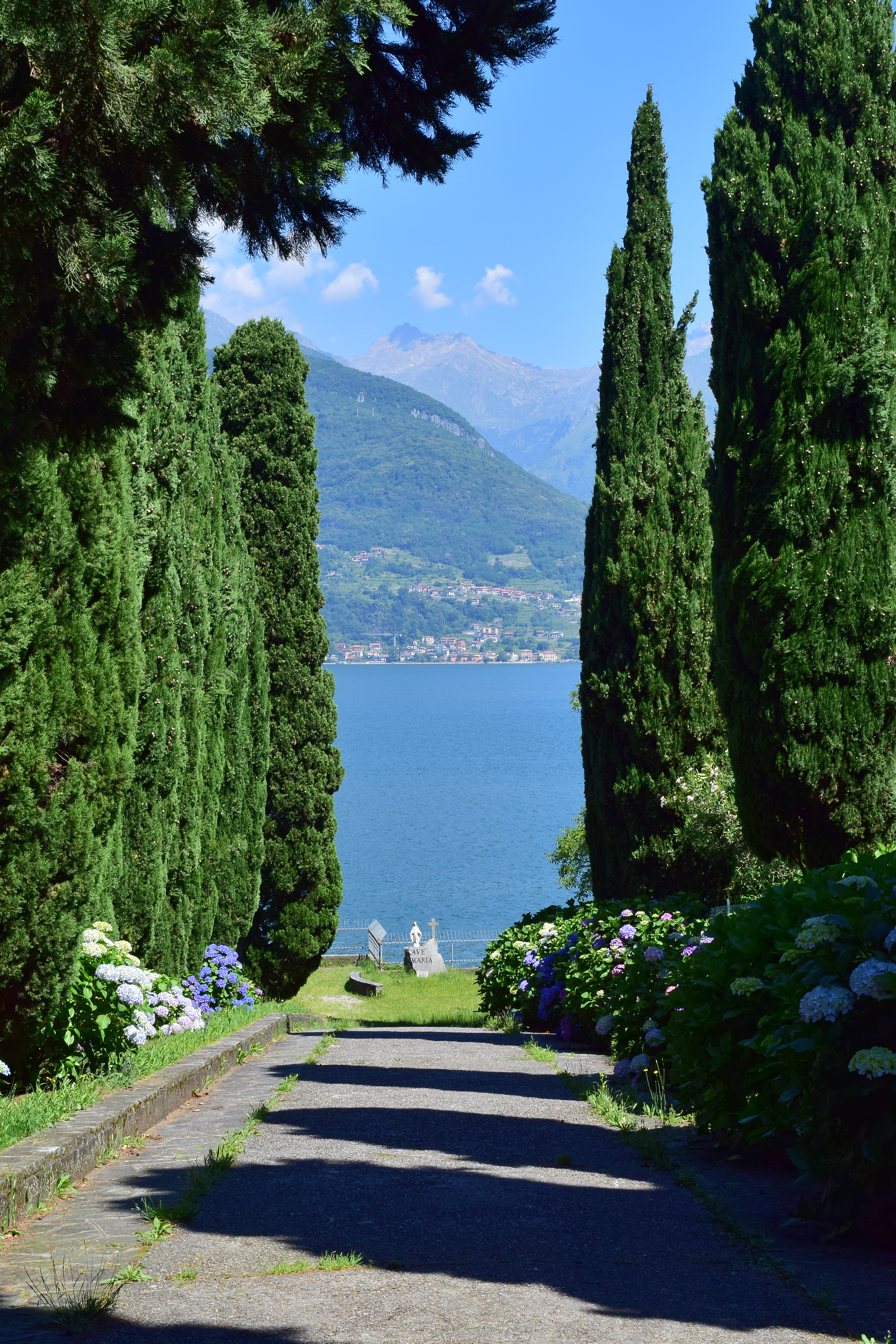 Mittelmeerzypressen iIm Kloster Piona (Gemeinde Colico)